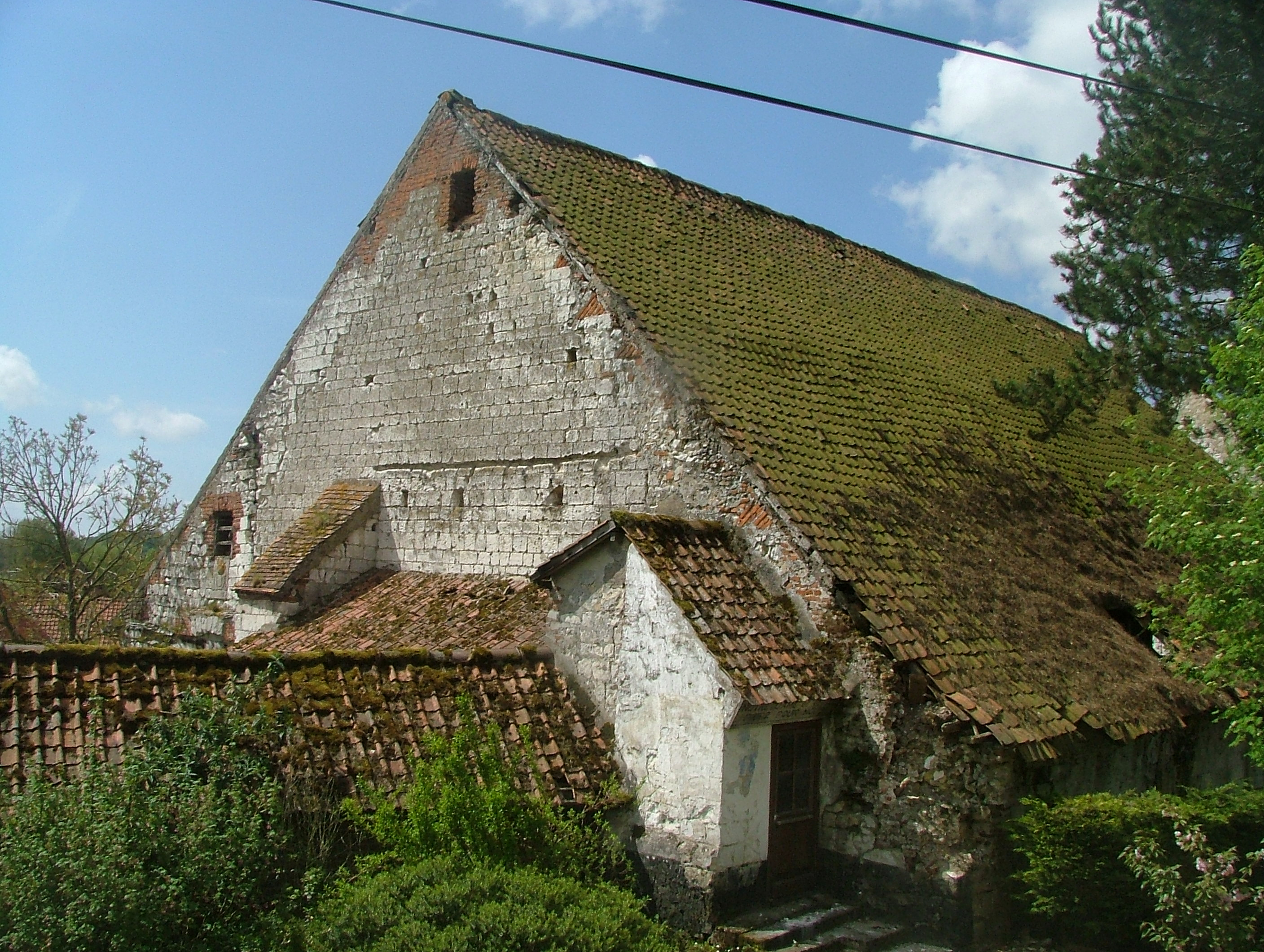 Ferme de l'Abbiette, à Attin .